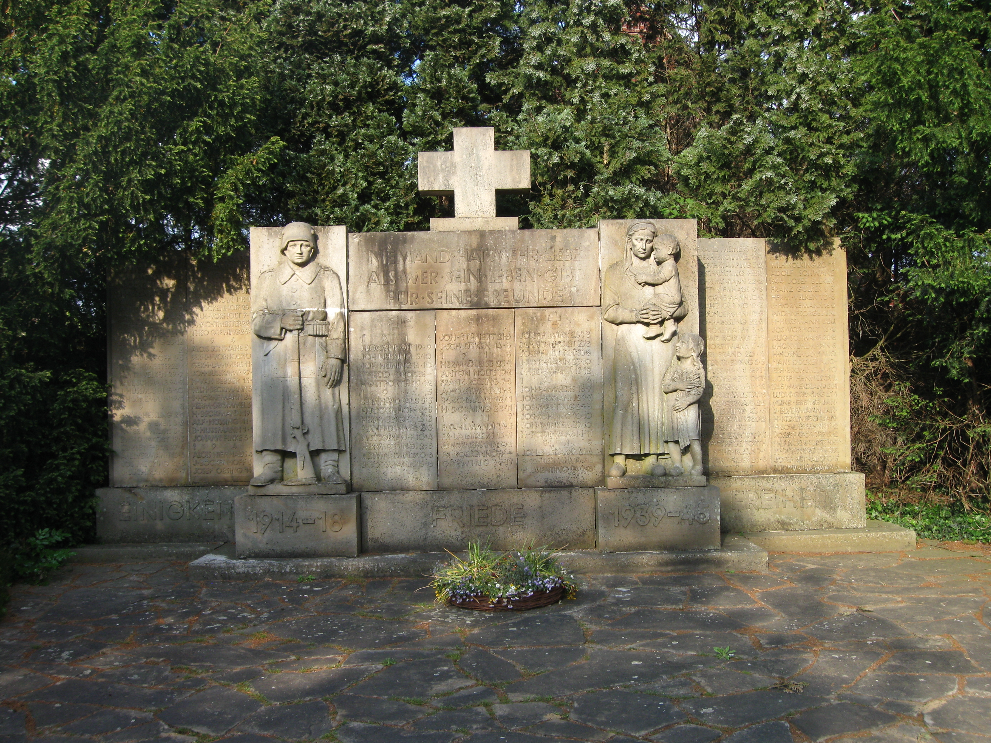 Monumento a los caídos en Erle, Alemania